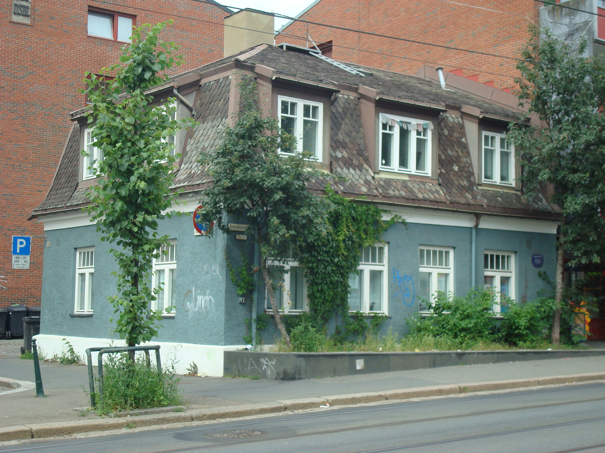 Aksisehuset i Trondheimsveien 30 i Oslo.